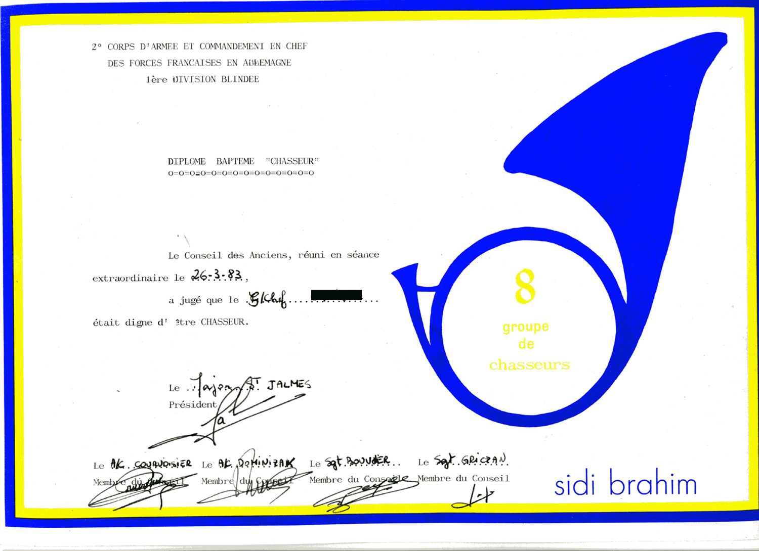 Diplome Baptieme Chasseur